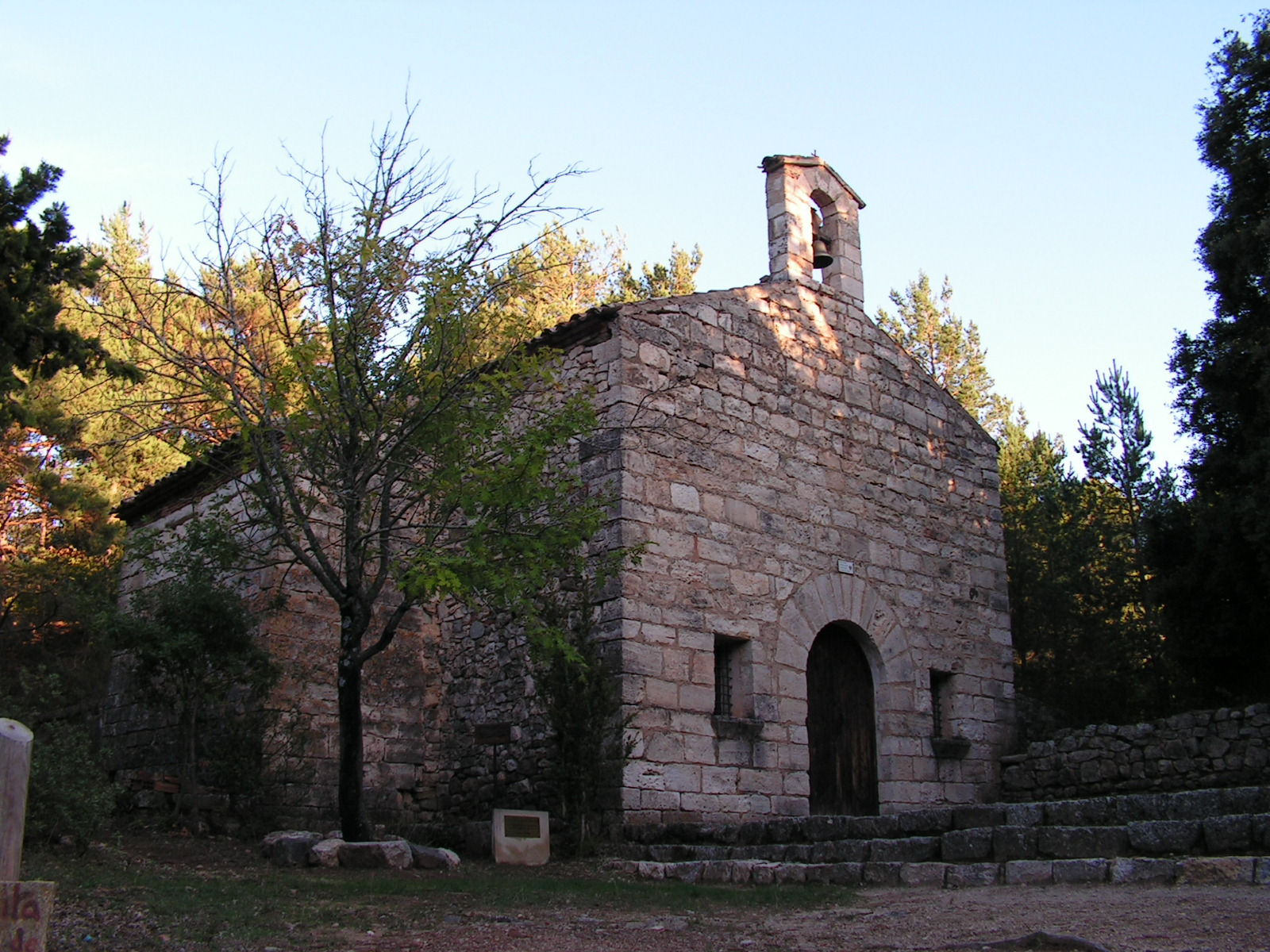 Ermita de la Mare de Déu de Barrulles (Capafonts)